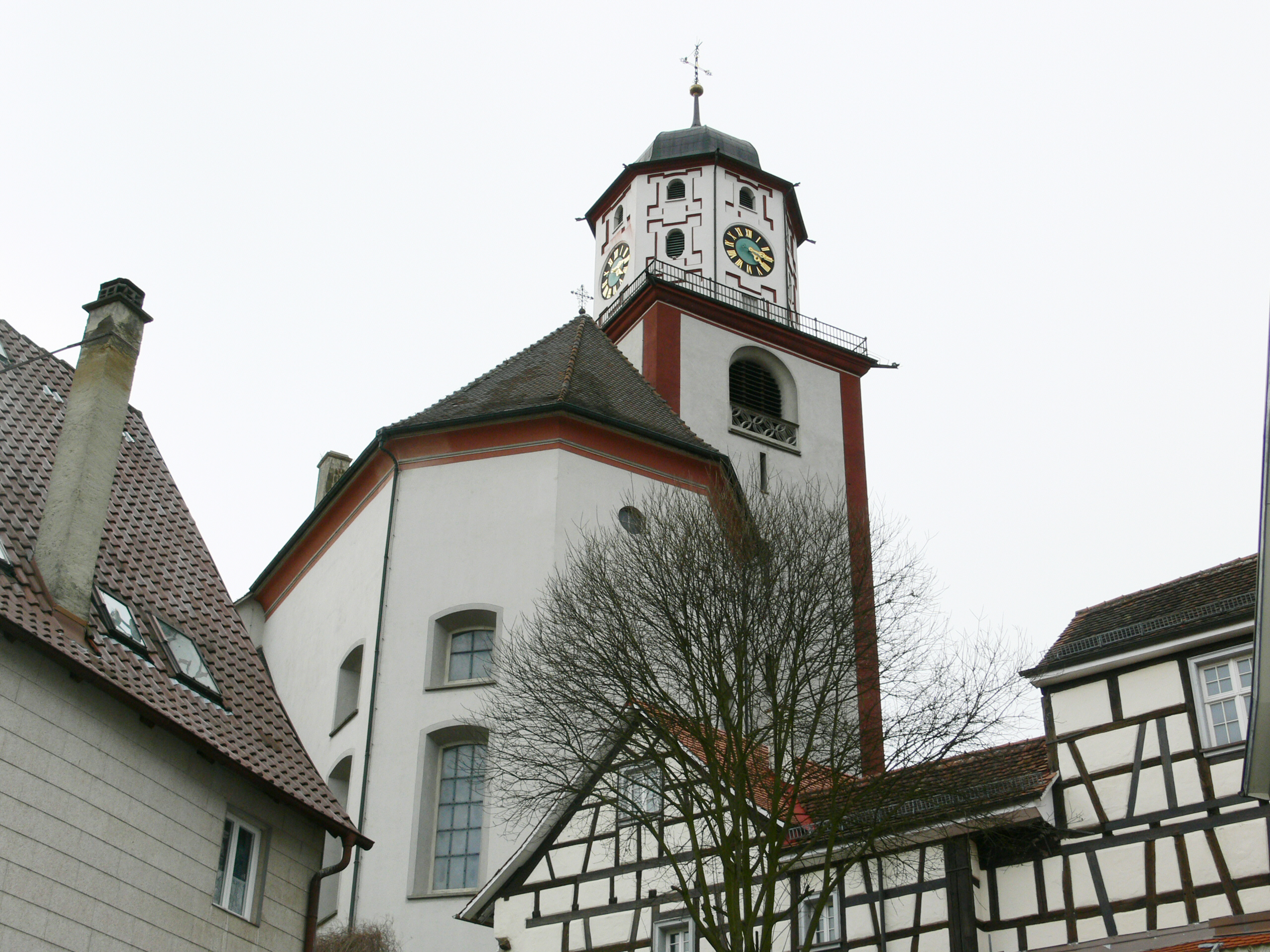 Meßkirch, Germany: Pfarrkirche St. Martin